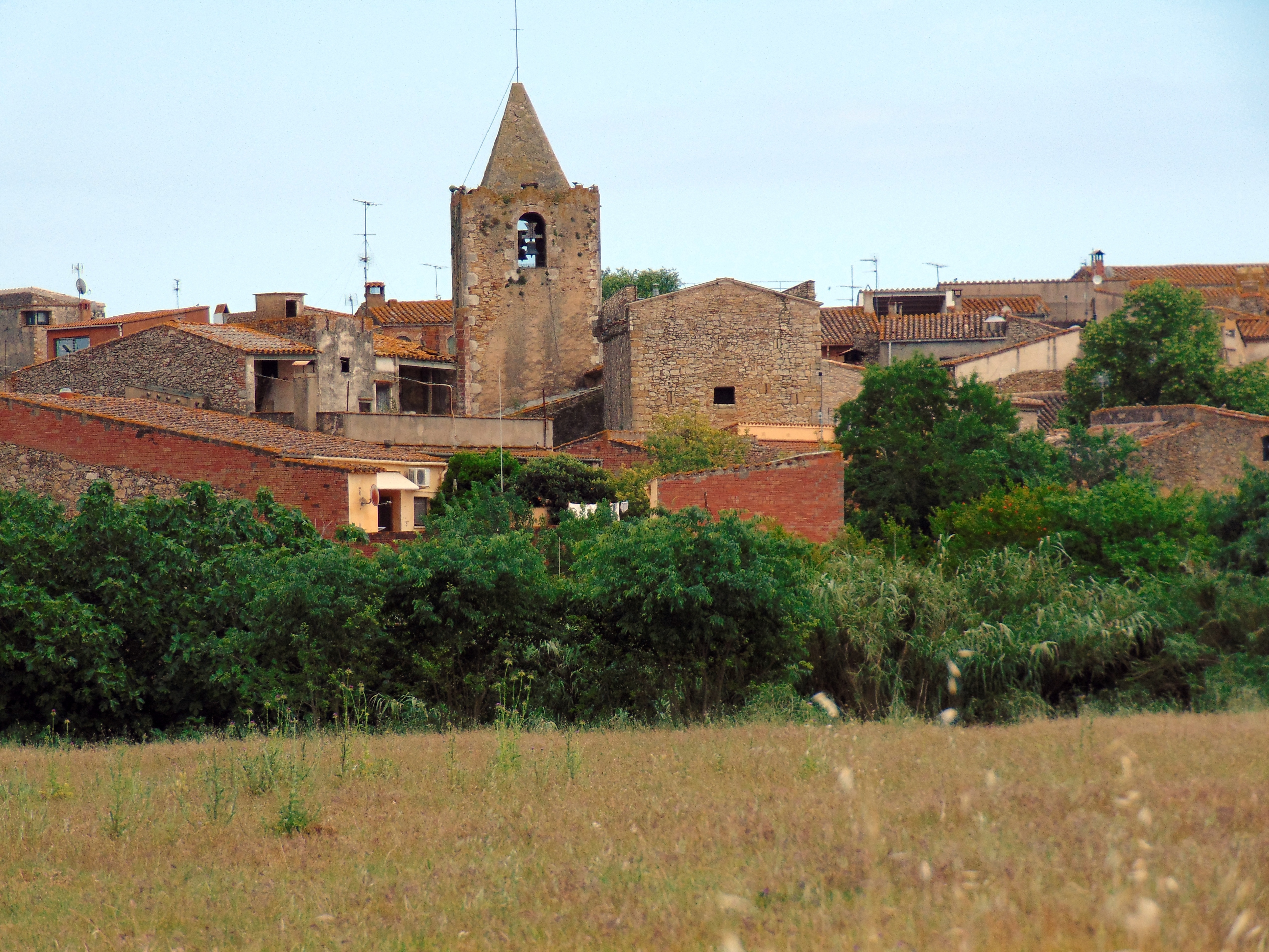 Església de Santa Maria de Fonteta (Forallac)